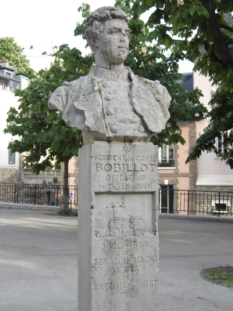 buste du sergent Jules Bobillot, mort au Tonkin en 1885